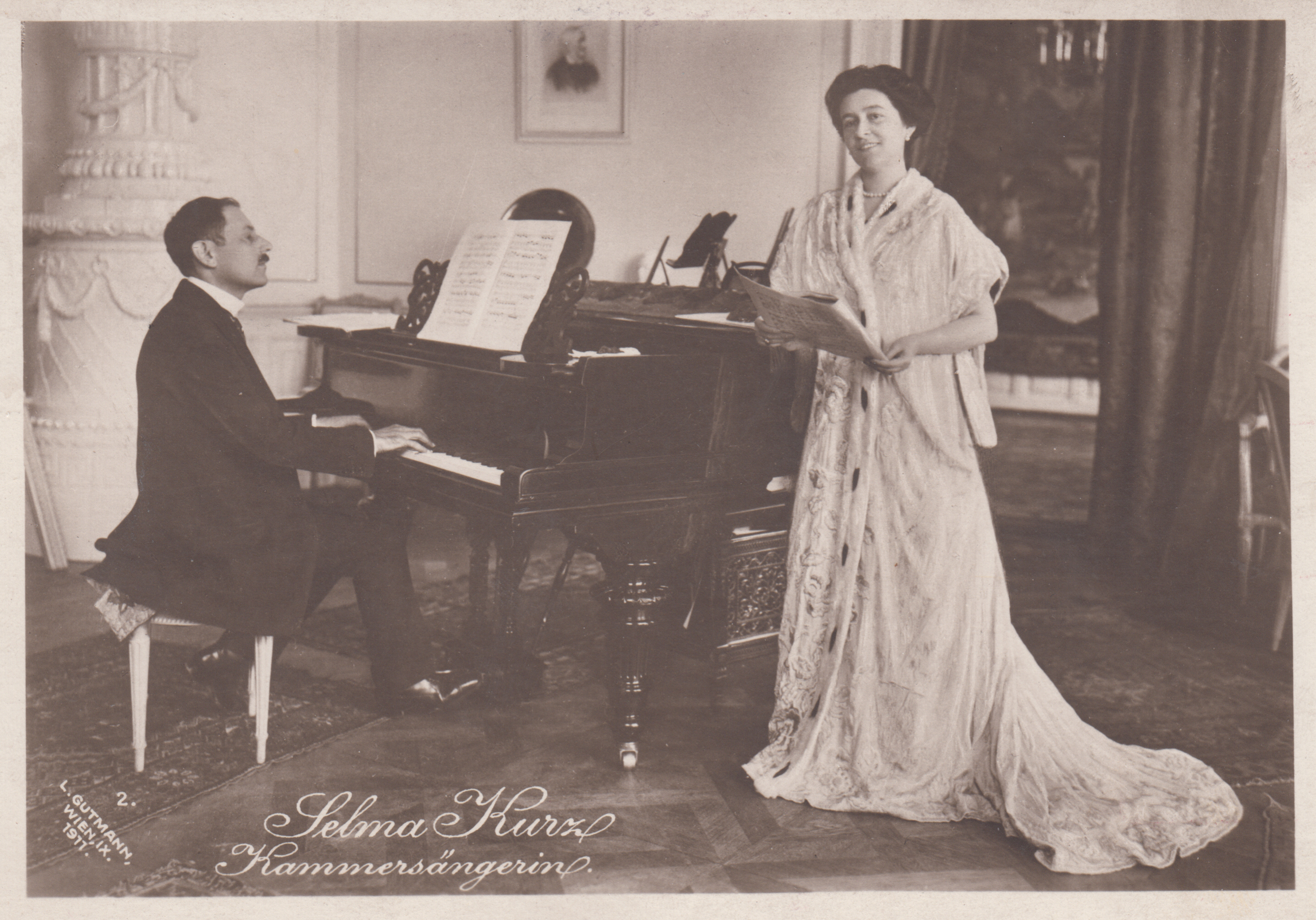 Selma Kurz 1911